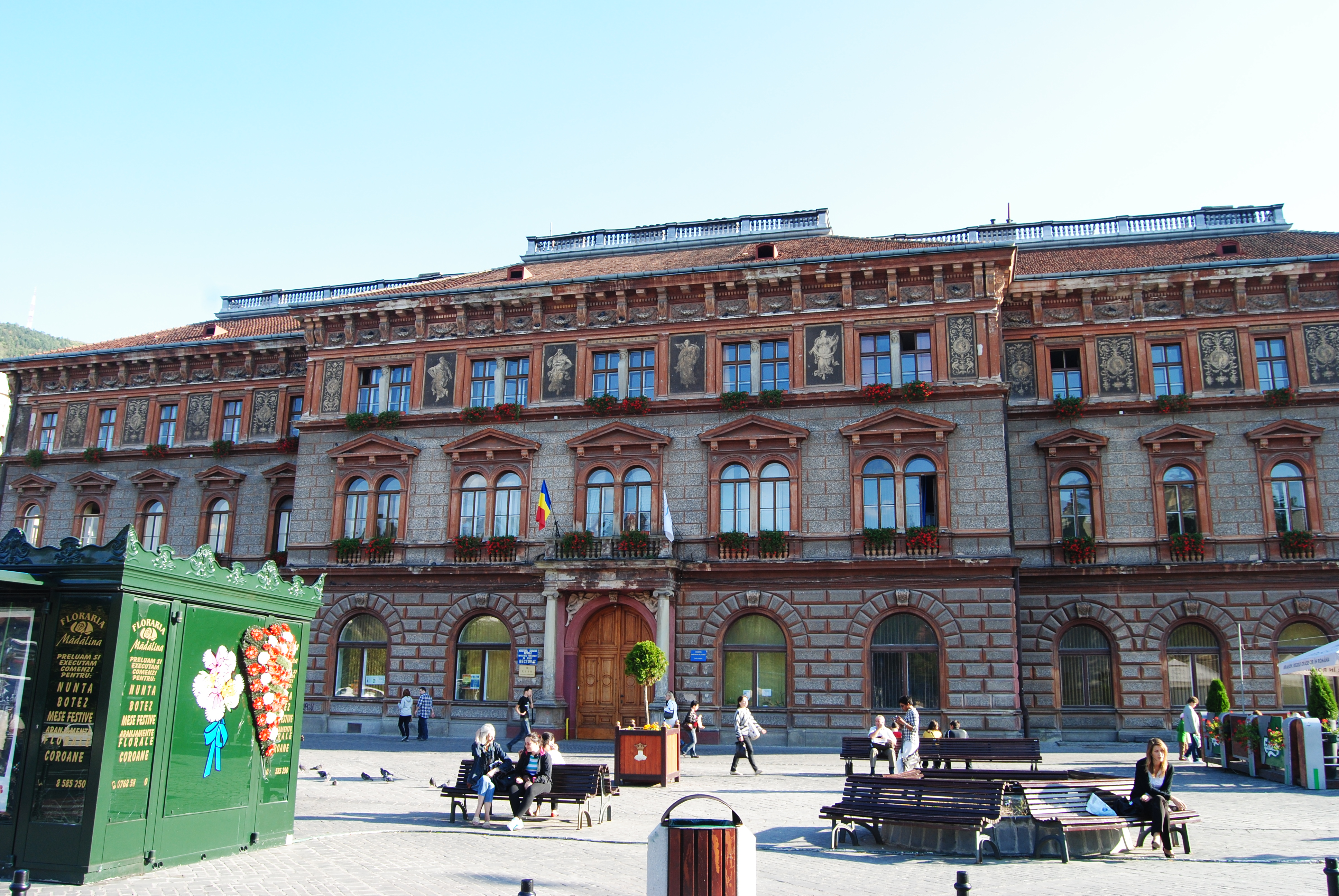 Fosta Prefectură, azi Rectoratul Universității Transilvania din Brașov